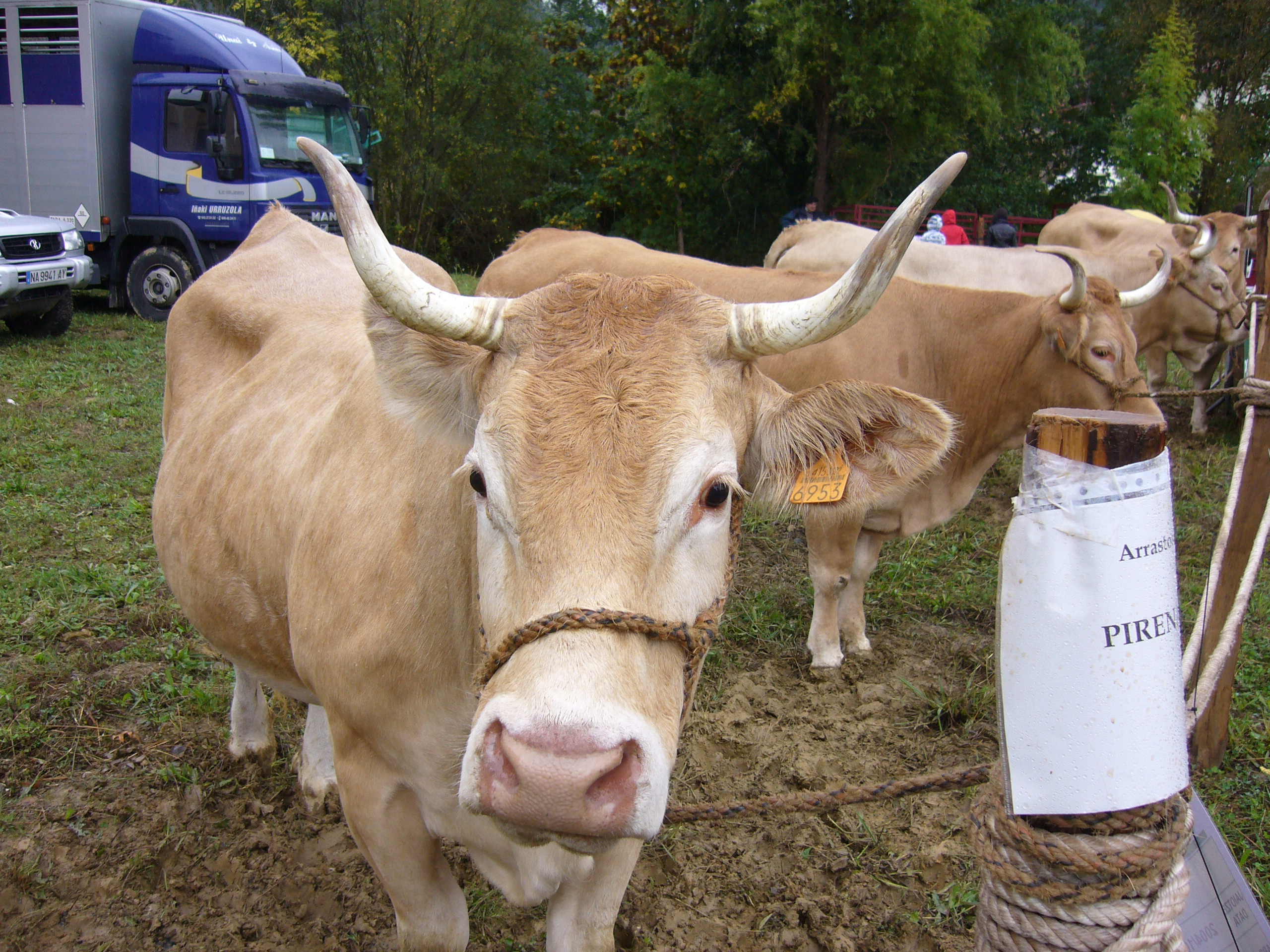 Piriniar behia Ormaiztegiko Azoka